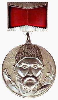 Государственная премия имени Коста Хетагурова